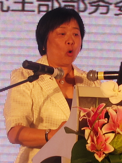 第十一届全国人民代表大会财政经济委员会副主任委员 吴晓灵；摄于中国人民银行研究生部30周年校庆活动